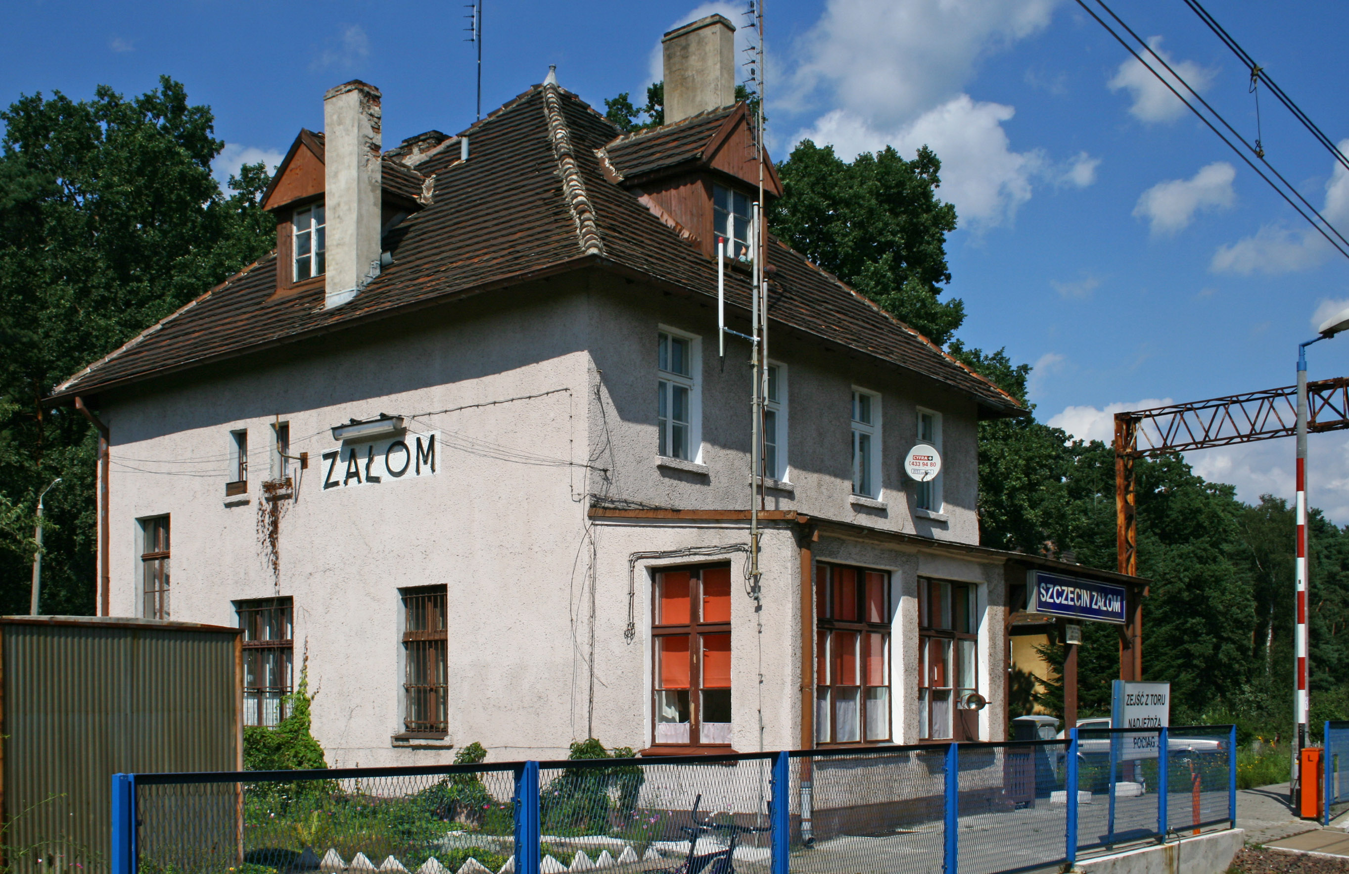 Szczecin Załom Stacja Kolejowa